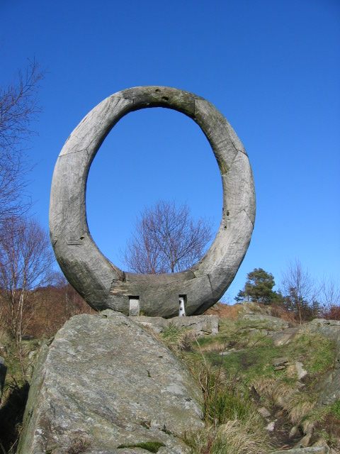 Panopticon sculpture on Carron Crag, Grizedale Forest, Cumbria